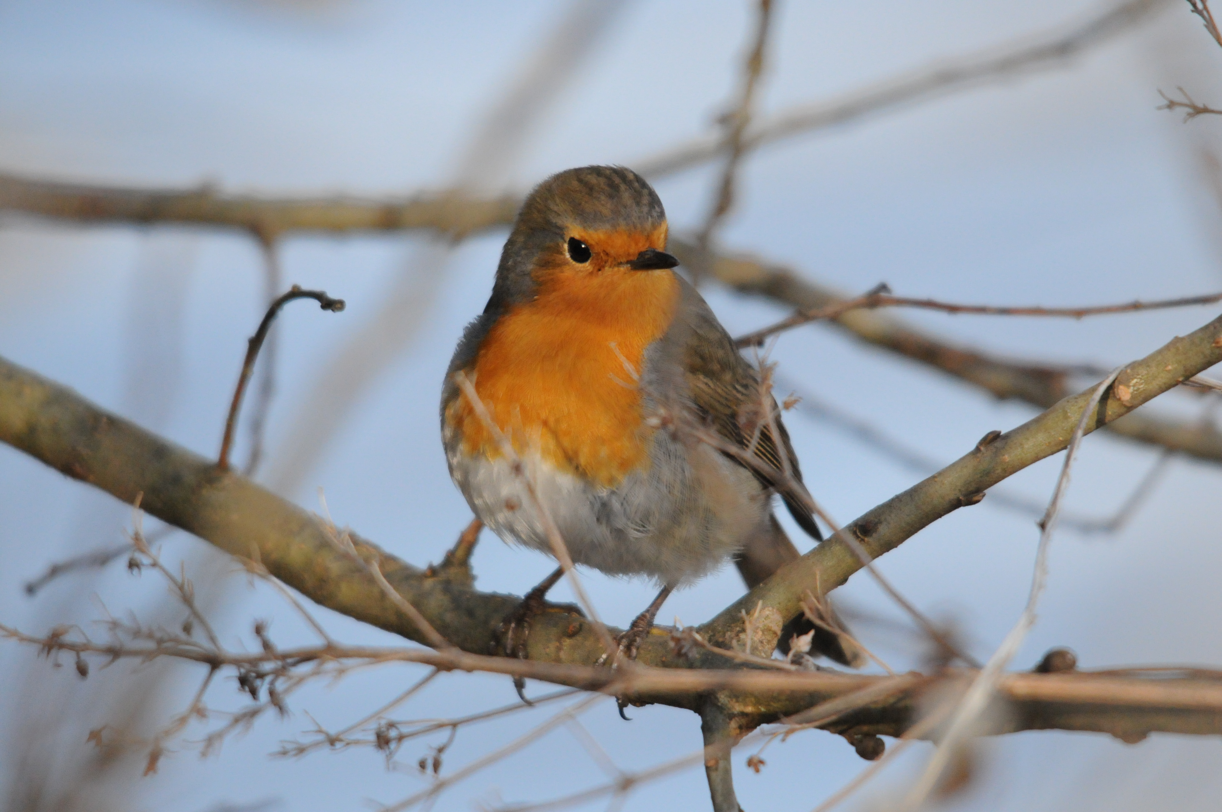 Rouge-gorge familier